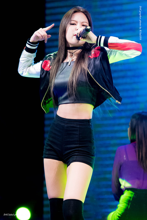 [17.05.17] 블랙핑크 제니